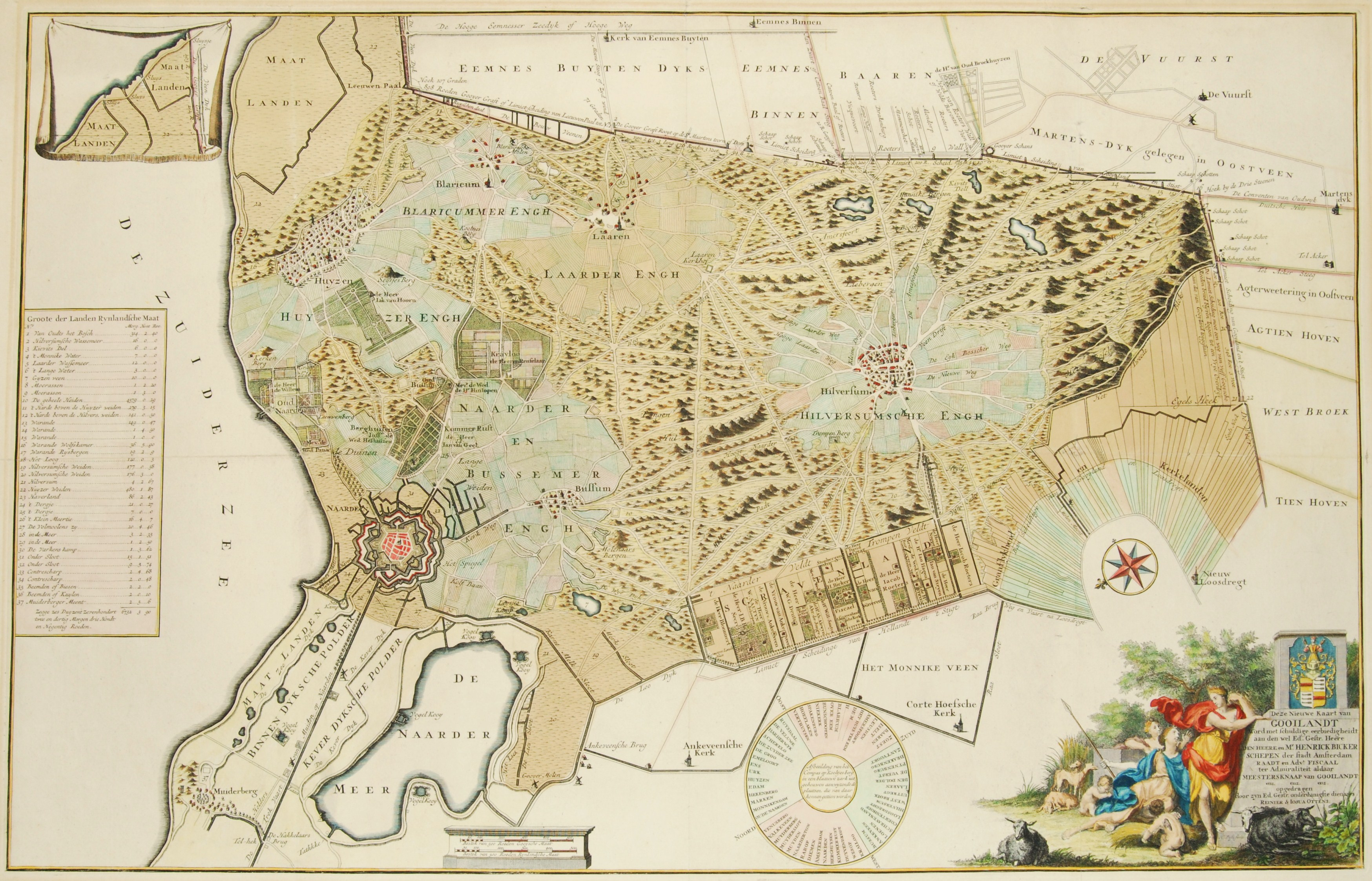 "Nieuwe kaart van Gooilant" Kopergravure vervaardigd door H. Post, uitgegeven tussen 1725 en 1734 door Reinier en Joshua Ottens.